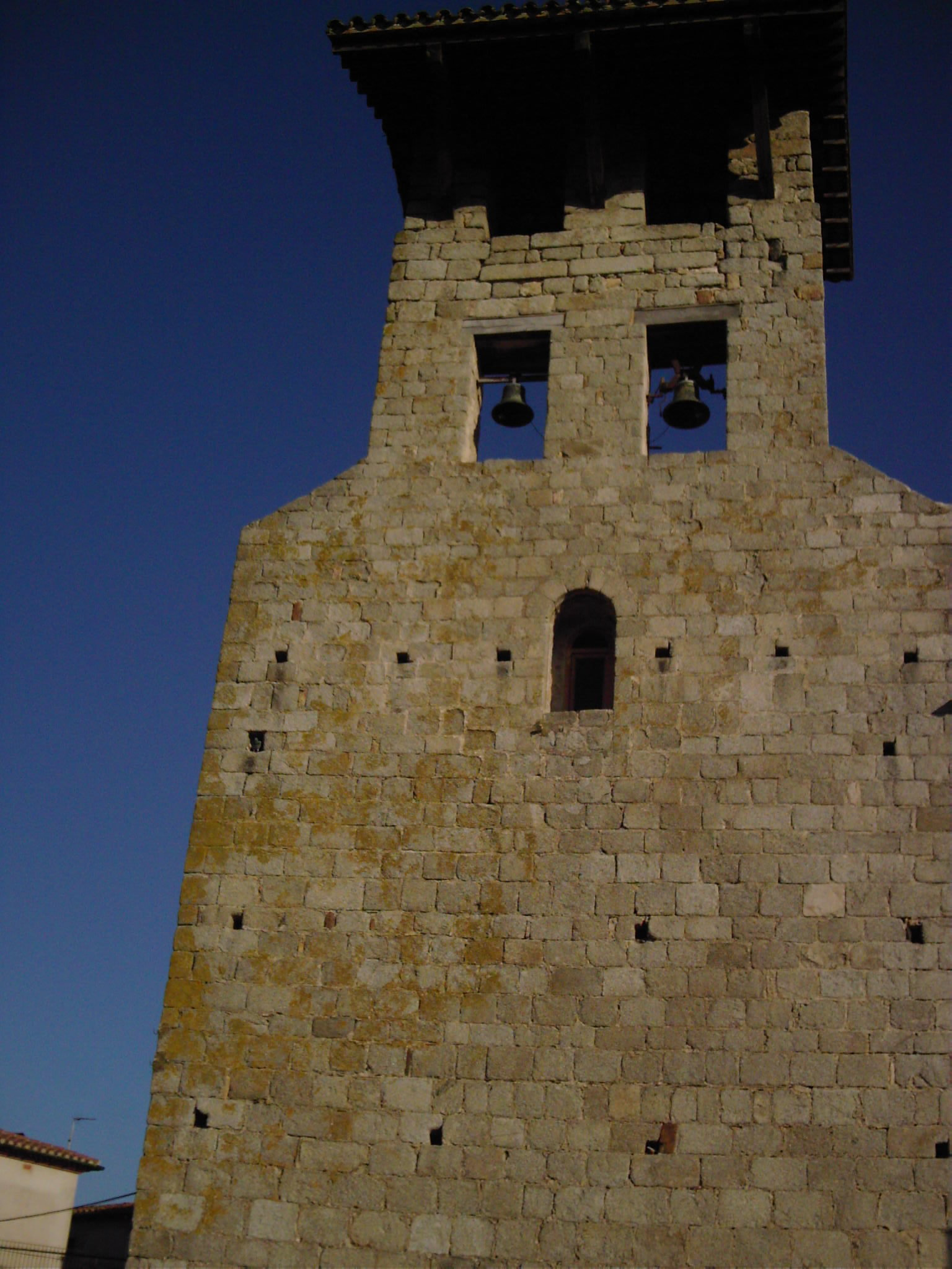 église sta Agata de Capmany (Alt Empordà)